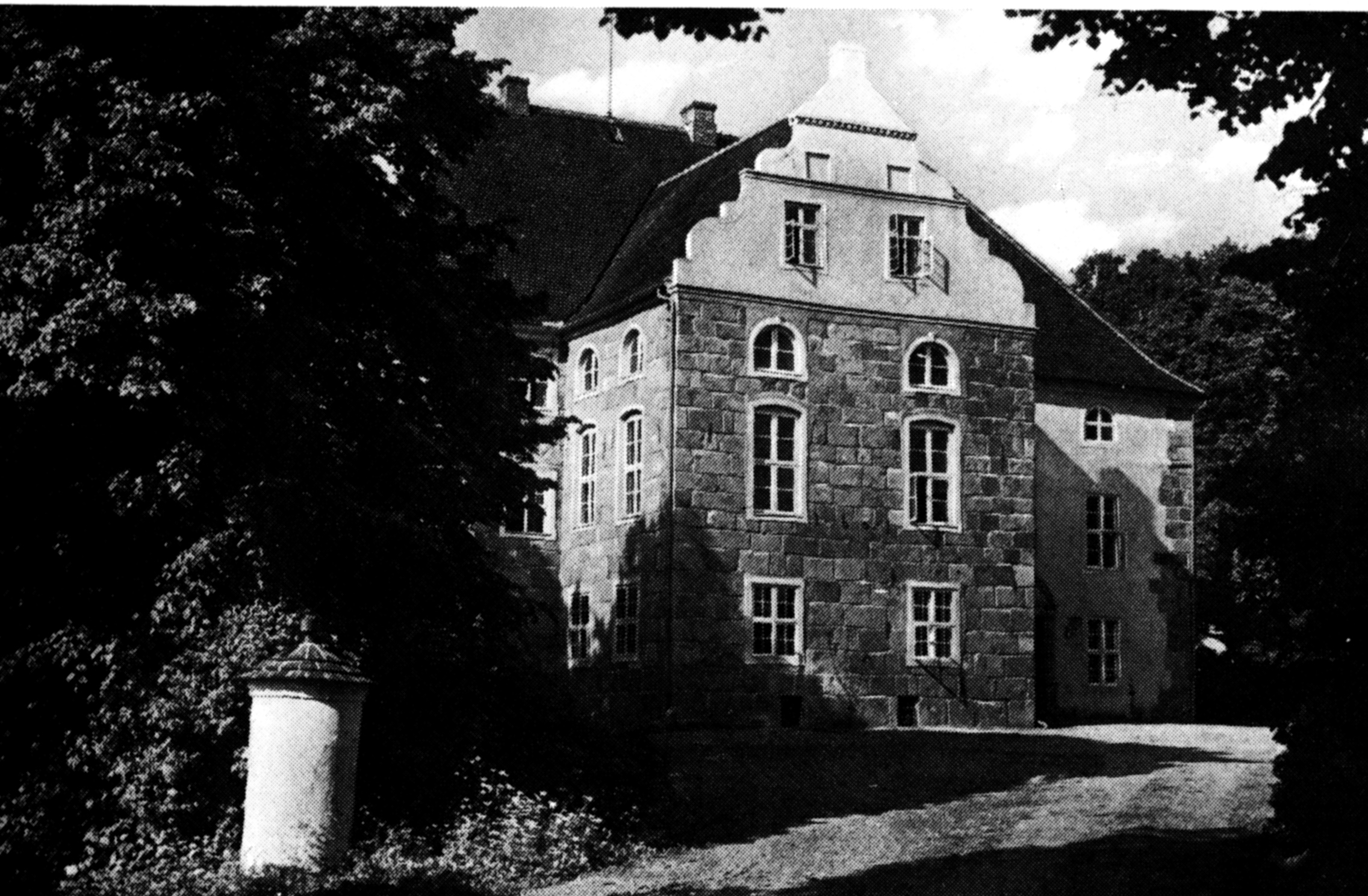 Herrenhaus Kurzen-Trechow in Mecklenburg Datum: um 1900 Urheber: Gustav Freiherr von Plessen zu Dolgen (mutmaßlich) Quelle: privates Fotoarchiv der eigenen (mütterl.) Familie